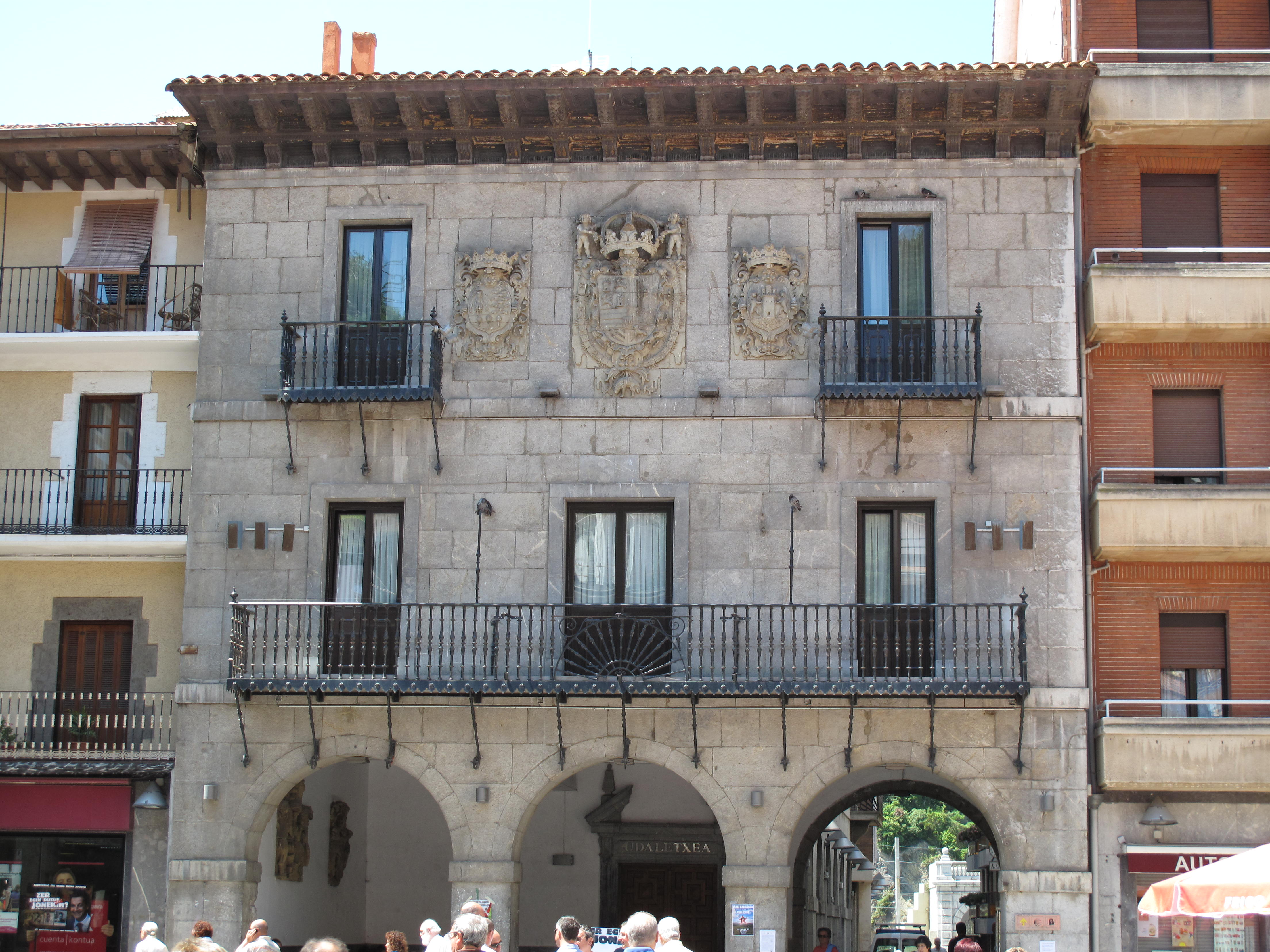 Ayto. de Deba(Gipuzkoa)